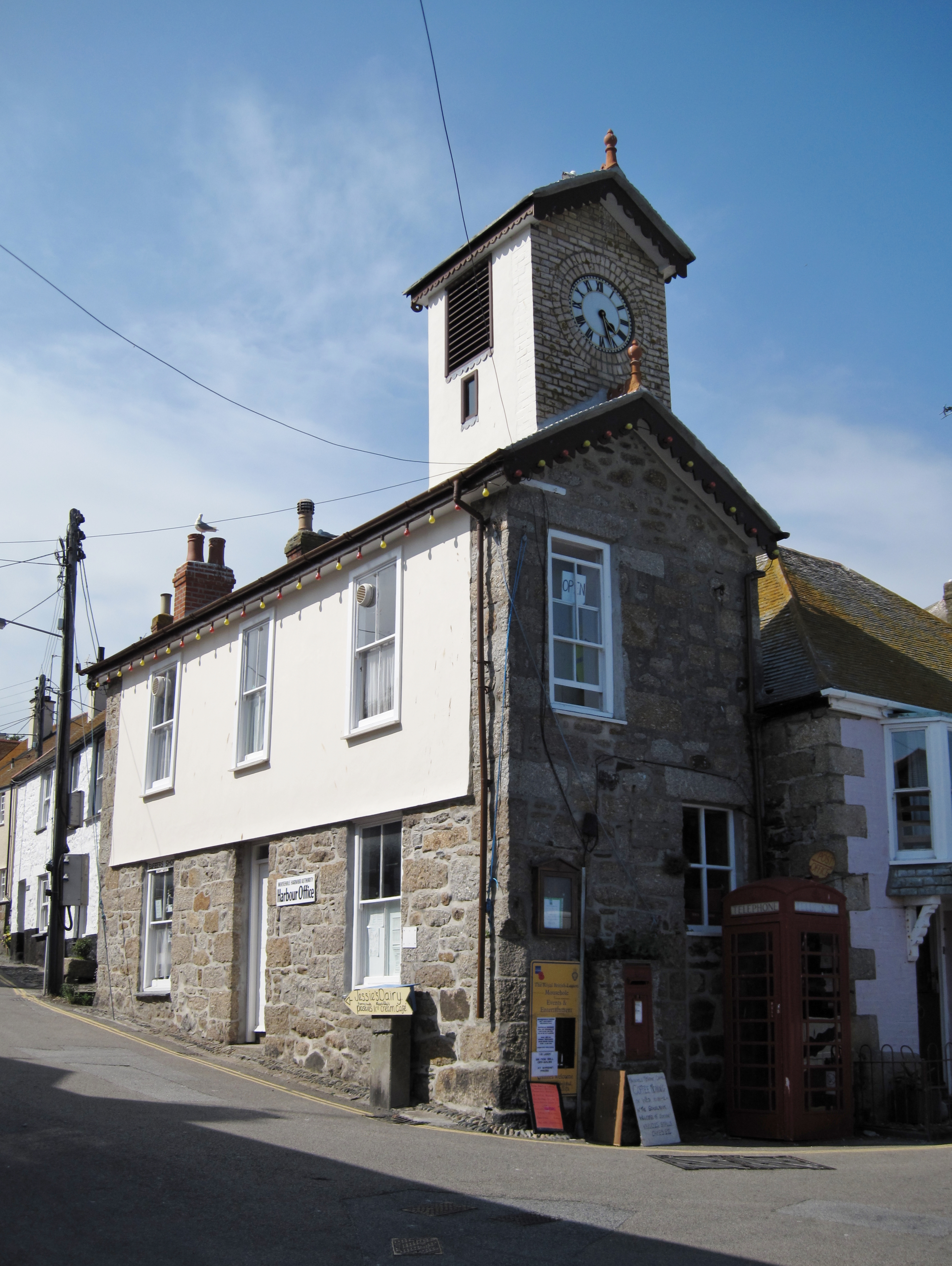 Harbour Office in Mousehole an der Südküste von Cornwall, England